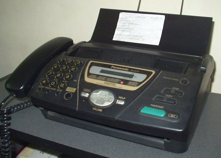 fax machiine. Mamun2a 08:59, 22 August 2006 (UTC)